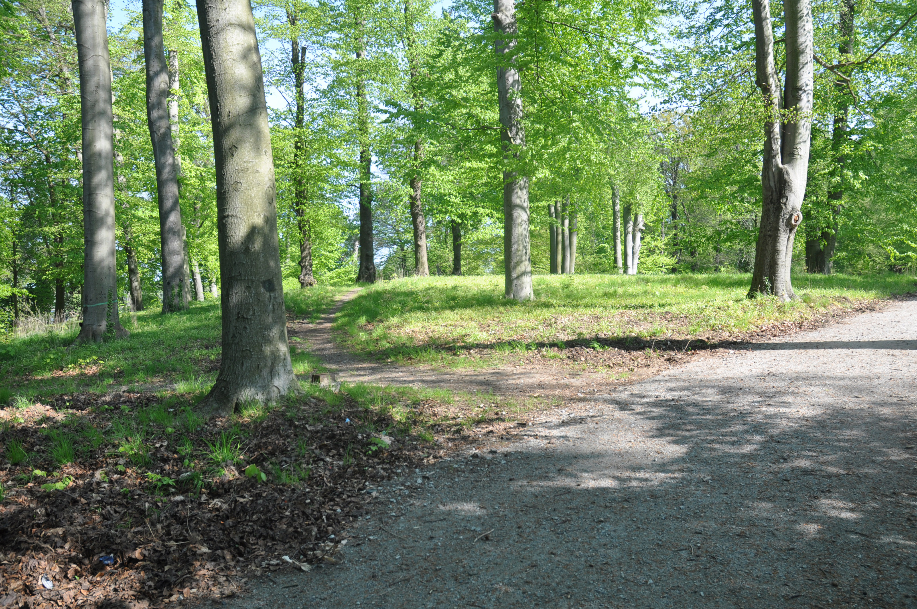 Park Klein-Glienicke, der Hügel des Geschützplatzes